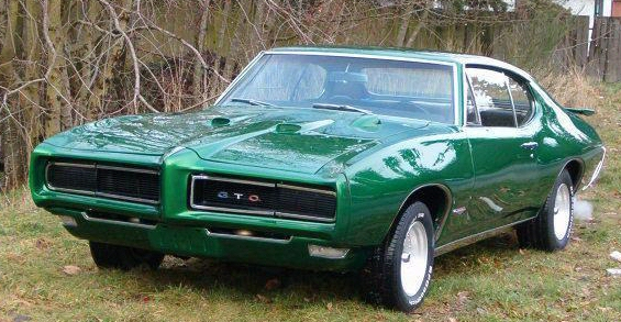 1968 Pontiac GTO